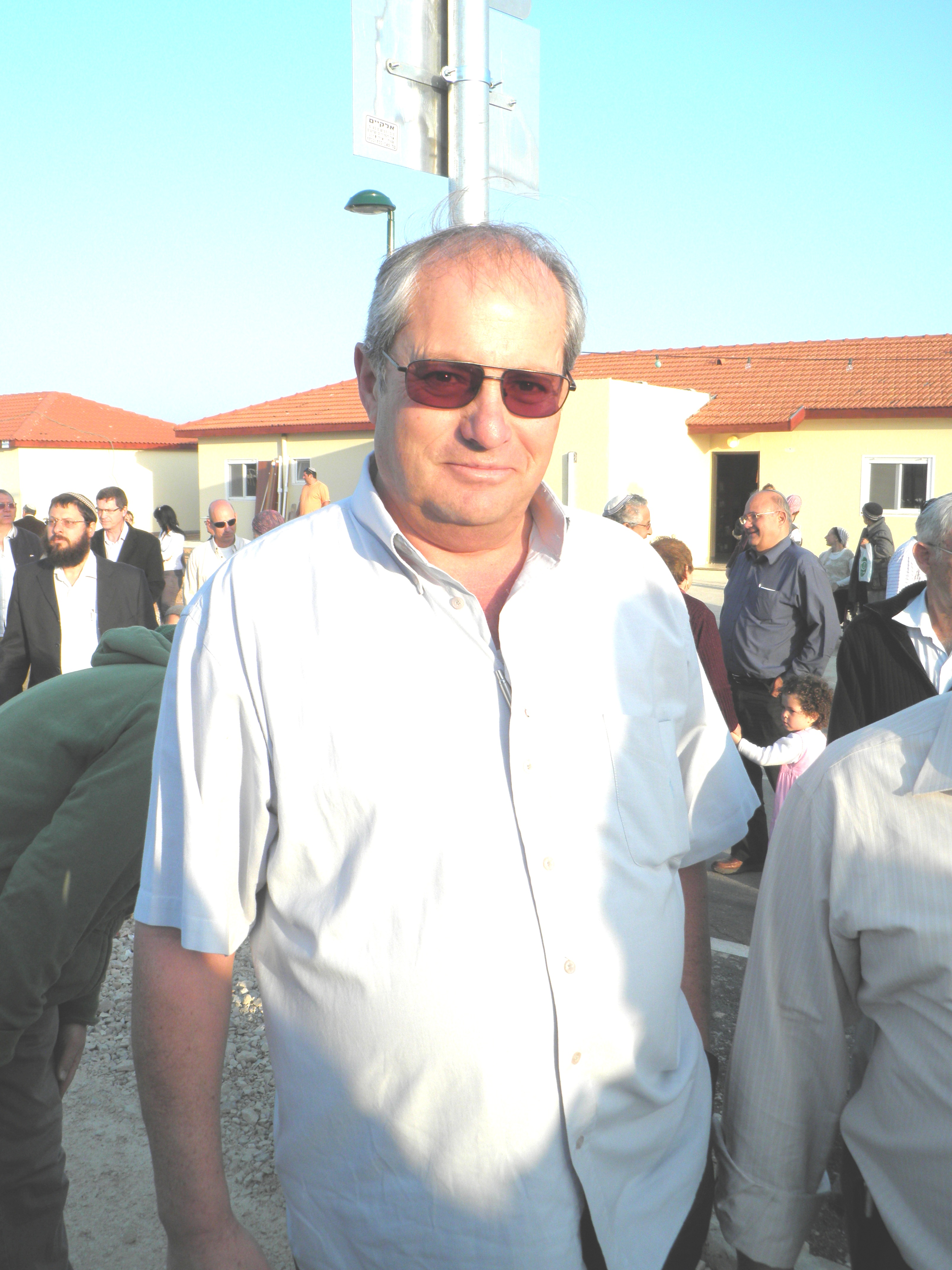 ח"כ צבי הנדל בטקס העלייה לקרקע בכפר דרום